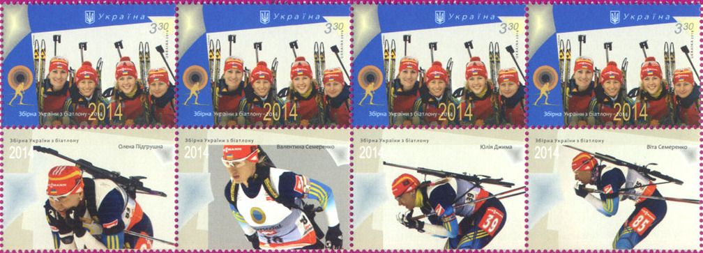 Марка України «Збірна України з біатлону-2014» На купонах зображено фото: «Олена Підгрушна», «Валентина Семеренко», «Юлія Джима», «Віта Семеренко».